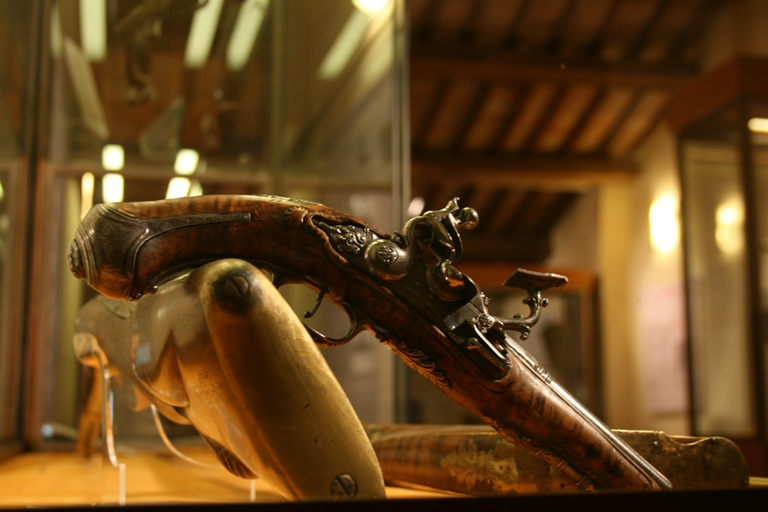 Sala delle armi da fuoco prodotte nel Settecento dagli armaioli anghiaresi